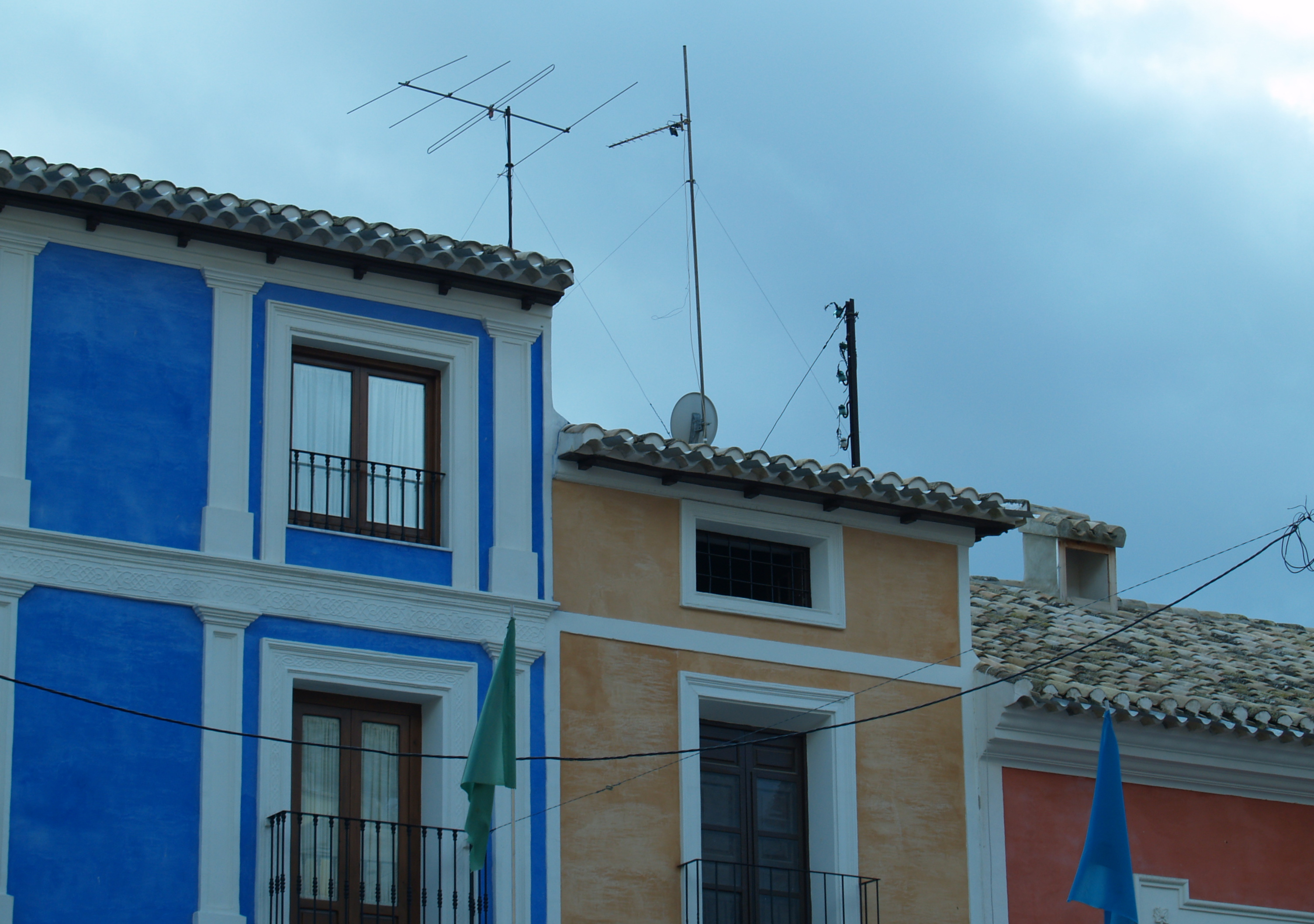 Mulako plazan